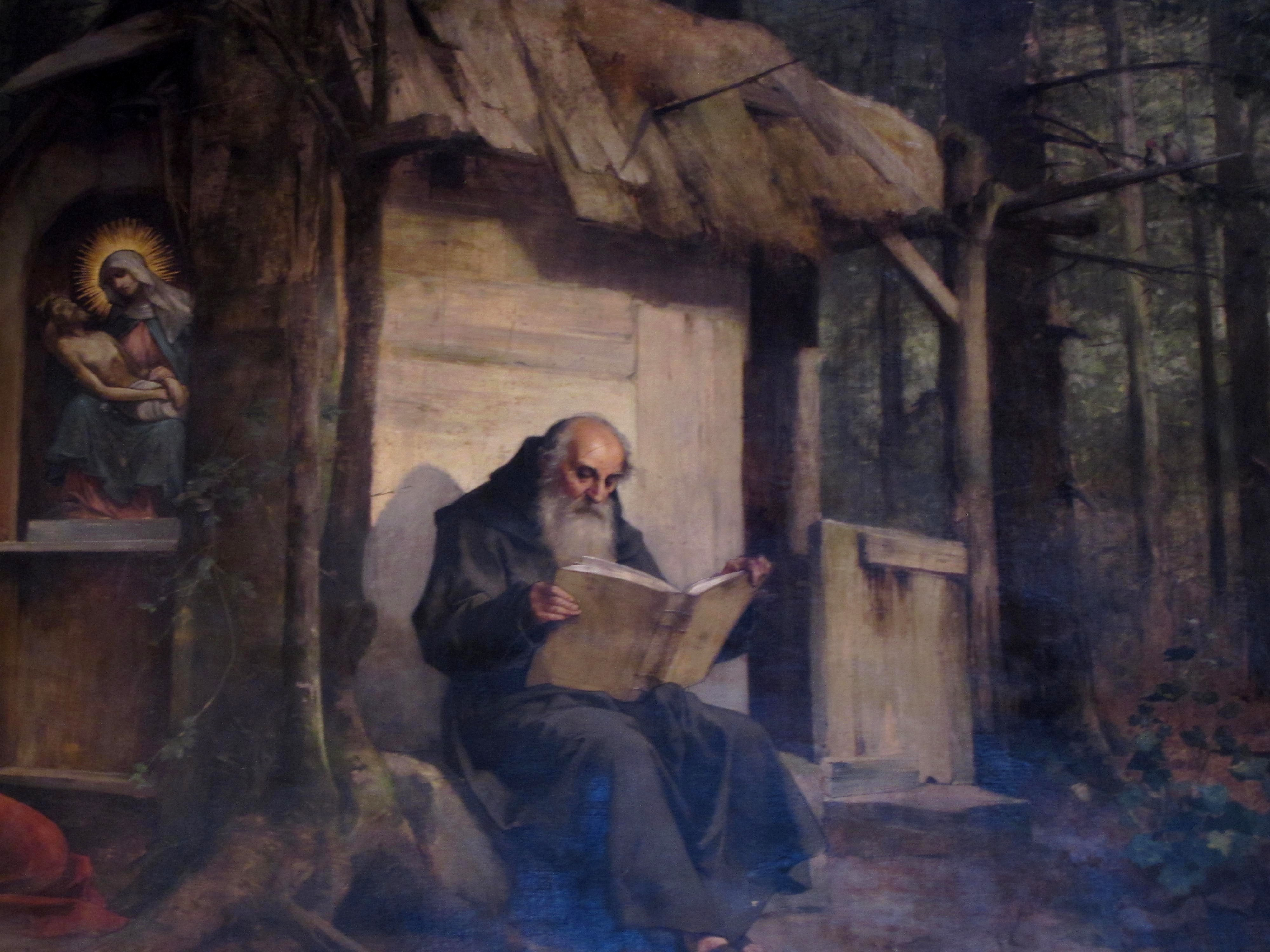 Alsace, Bas-Rhin, Haguenau, Basilique Notre-Dame-des-Douleurs de Marienthal (ancien Prieuré des Guillemites) (IA00062022). Fresque "Origine légendaire de Marienthal" (Martin von Feuerstein, 280x830, 1889)